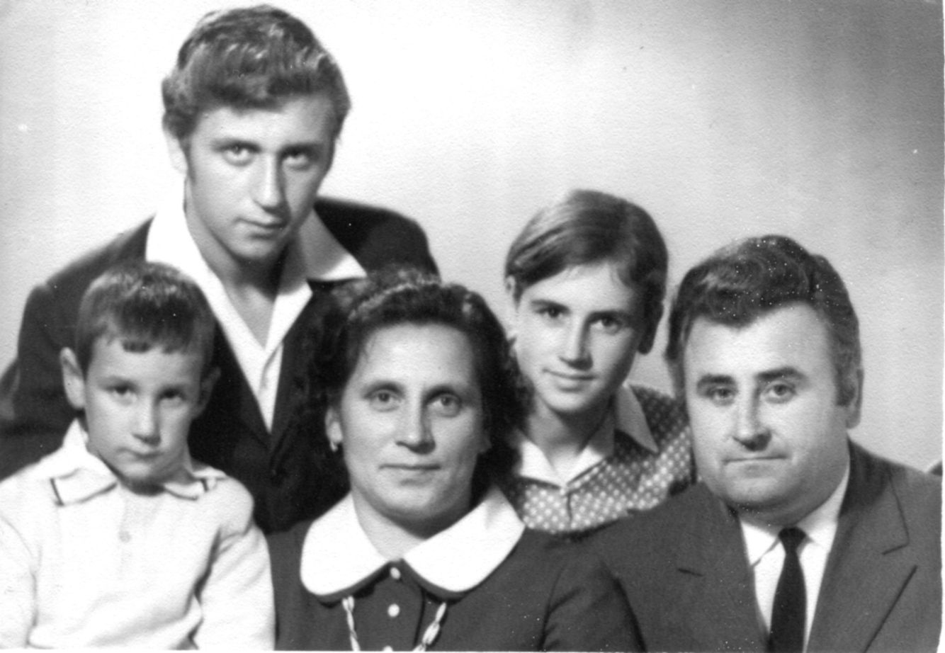 Писателят Петко Огойски със семейството си